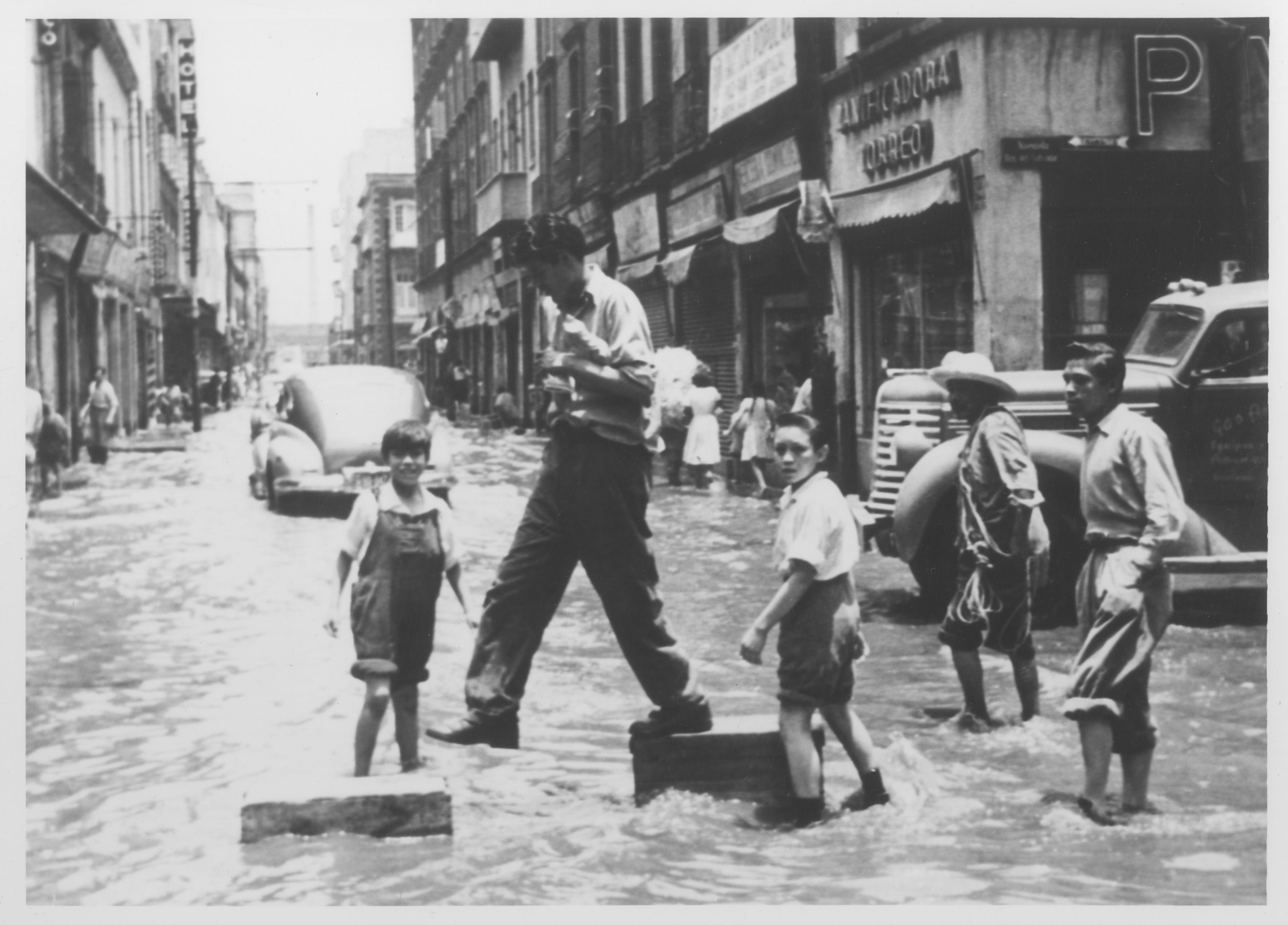 Fotografía antigua de la Ciudad de México resguardadas por el Museo Archivo de la Fotografía (MAF) de la Ciudad de México